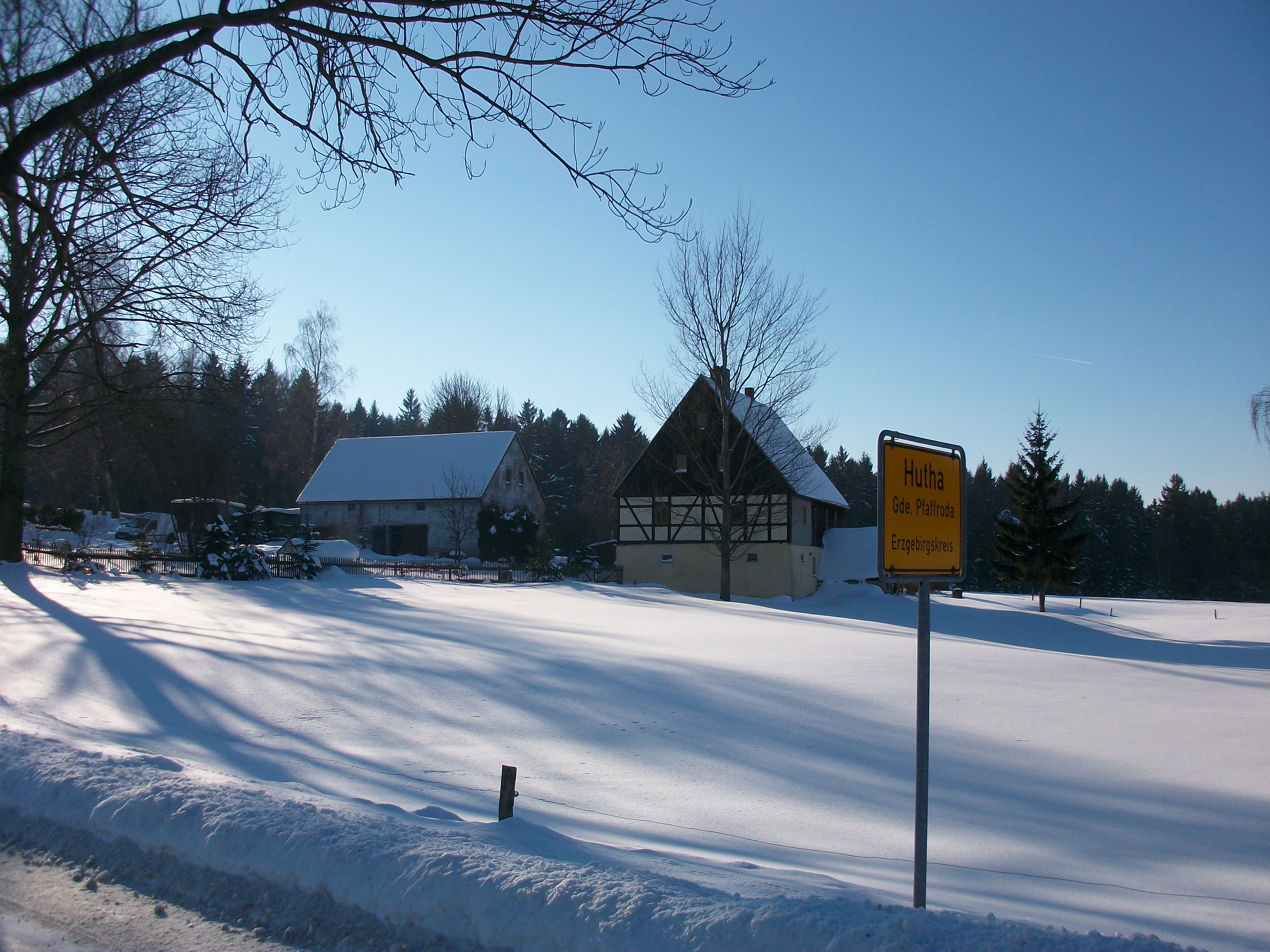 Hutha, historisches Ortsteingangsschild (2017)